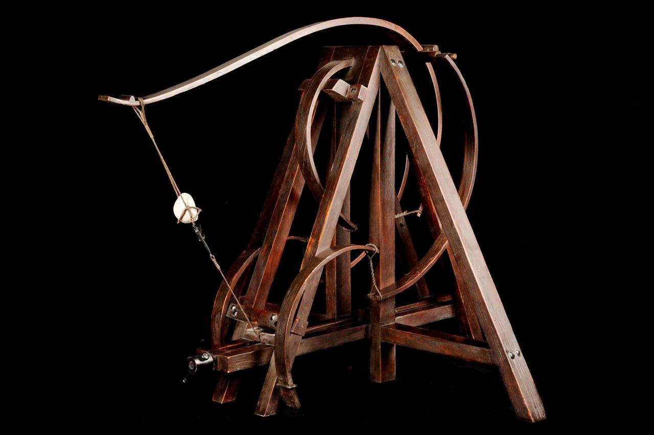 Il modello rappresenta una catapulta di legno a molle tirate da una madrevite posta nella base della struttura a capra. Funzione Questo balista è concepita per lanciare sassi con traiettoria a parabola. Modalità d'uso Questo strumento di guerra è pensato per ottenere una grande potenza in modeste dimensioni. Particolarmente interessanti sono i vari dispositivi per aumentare la flessibilità delle molle assicurando così un lancio efficace